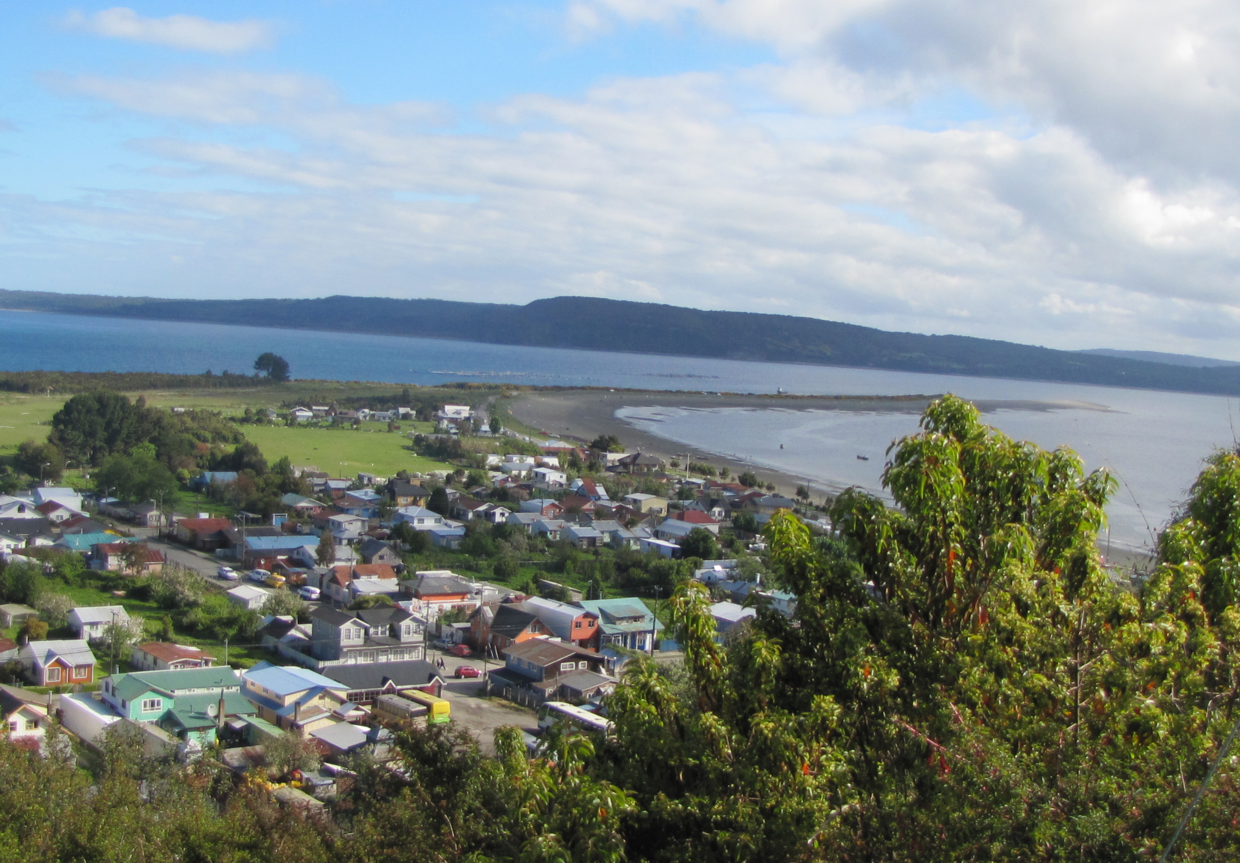 Queilen y Tranqui, Chile.